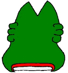 Glifo de Tepehuacán de Tepeji, Hidalgo